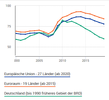 Öffentlicher Bruttoschuldenstand 2000—2019 in % des BIP für - Europäische Union - 27 Länder (ab 2020) - Euroraum - 19 Länder (ab 2015) - Deutschland